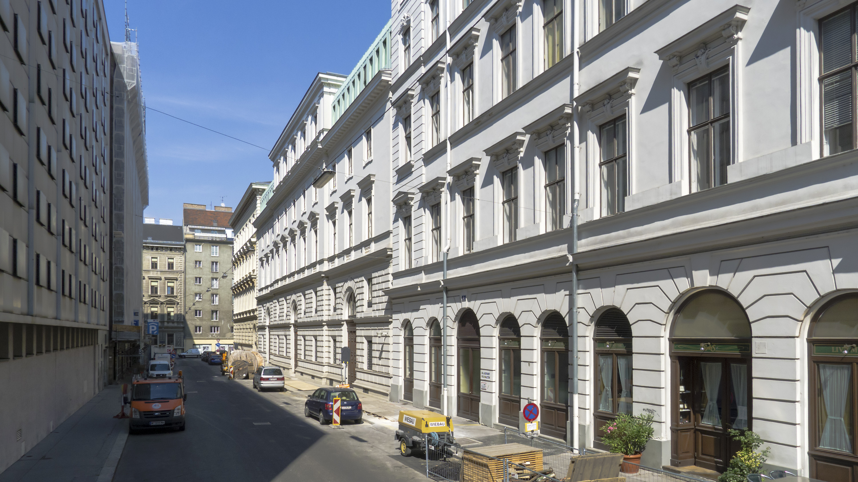 Cobdengasse in Wien 1 bei Nr. 5 Richtung Nordosten